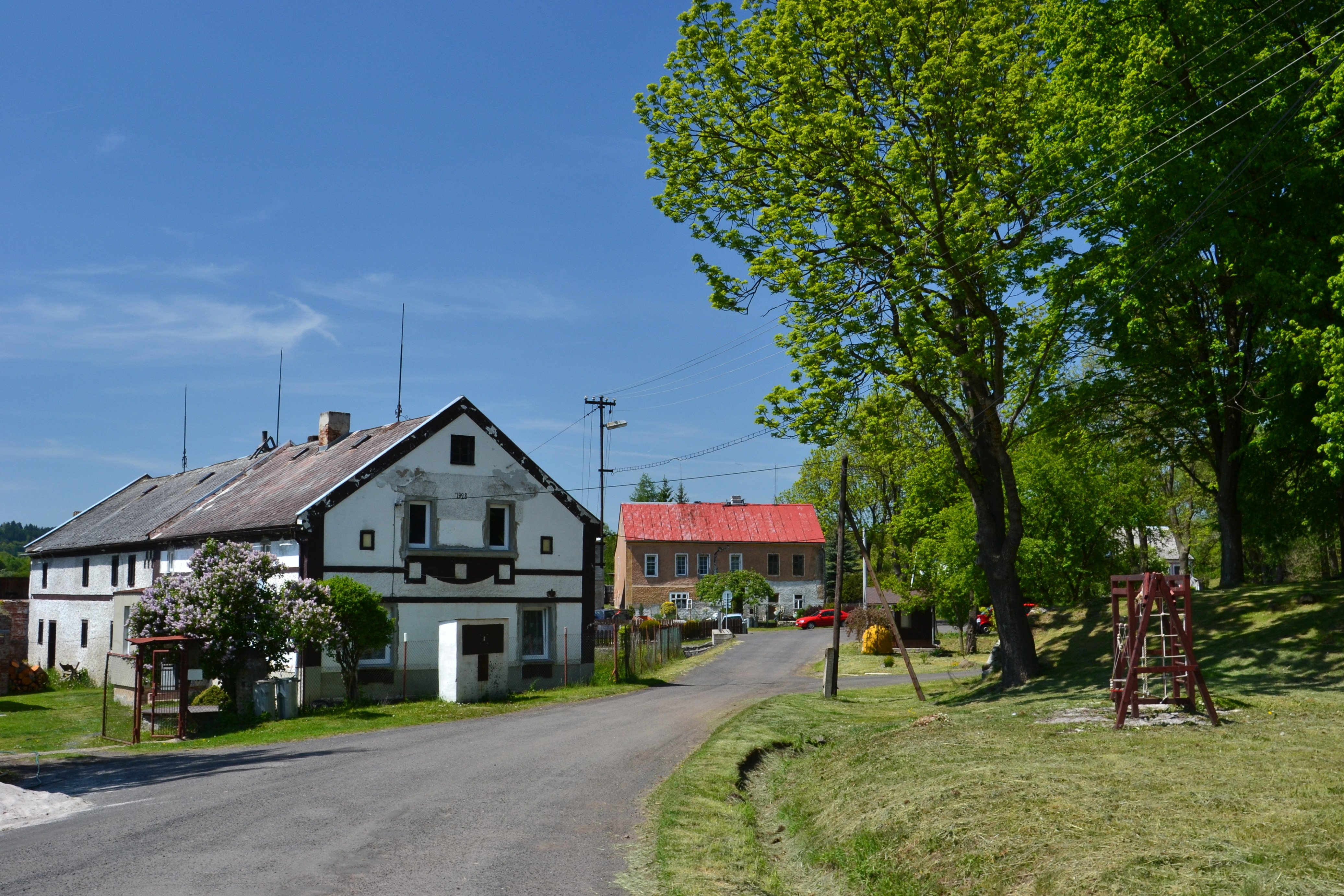 Týniště